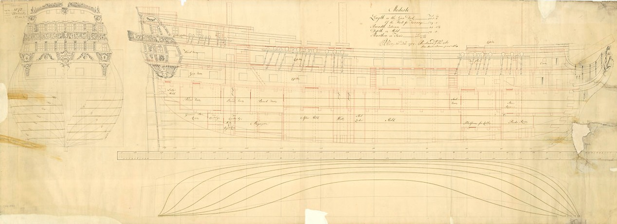 Plan du vaisseau français de 64 canons le Modeste, dressé en 1759 par la marine anglaise après sa capture à la bataille de Lagos.